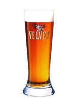 Snímek piva Velvet v pivní sklenici.